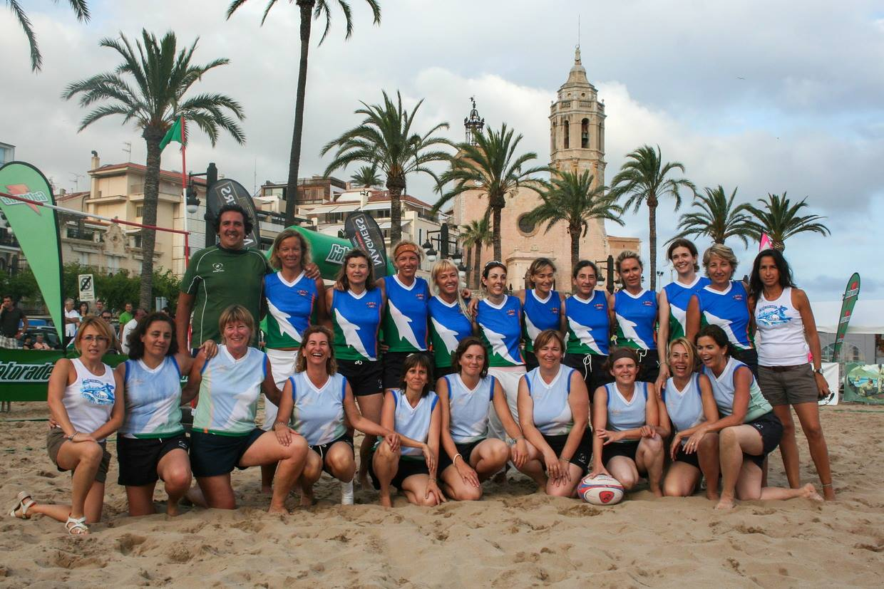 primer equipo femenino del rugby club sitges